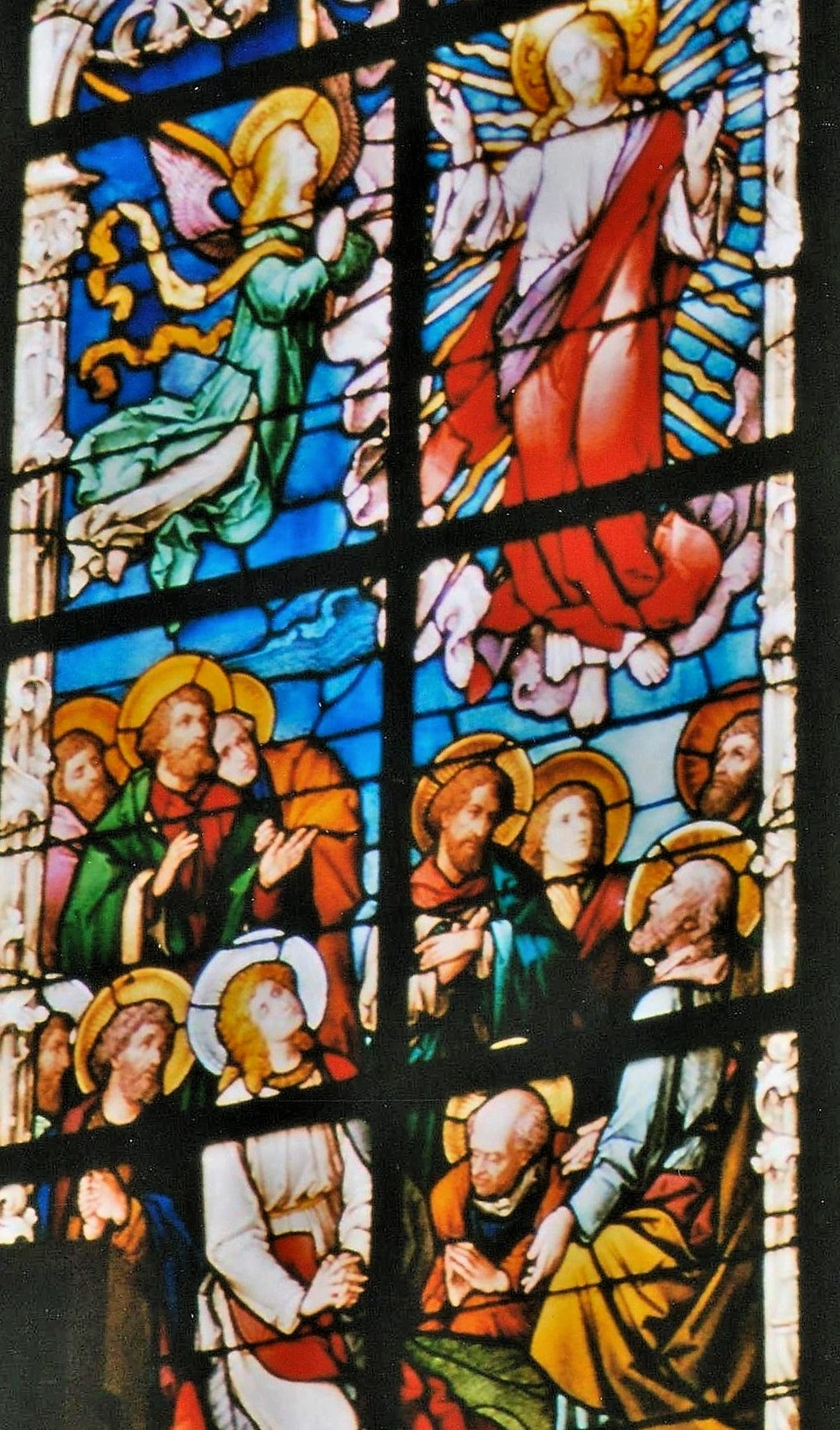 St. Michael (Lohr am Main), Chorfenster, Glorreicher Rosenkranz: Der in den Himmel aufgefahren ist